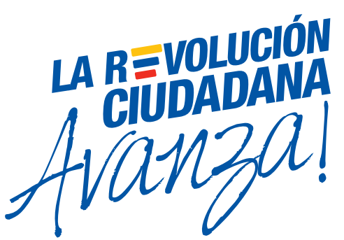 logo de la Robolución ciudadana Havanza 2011